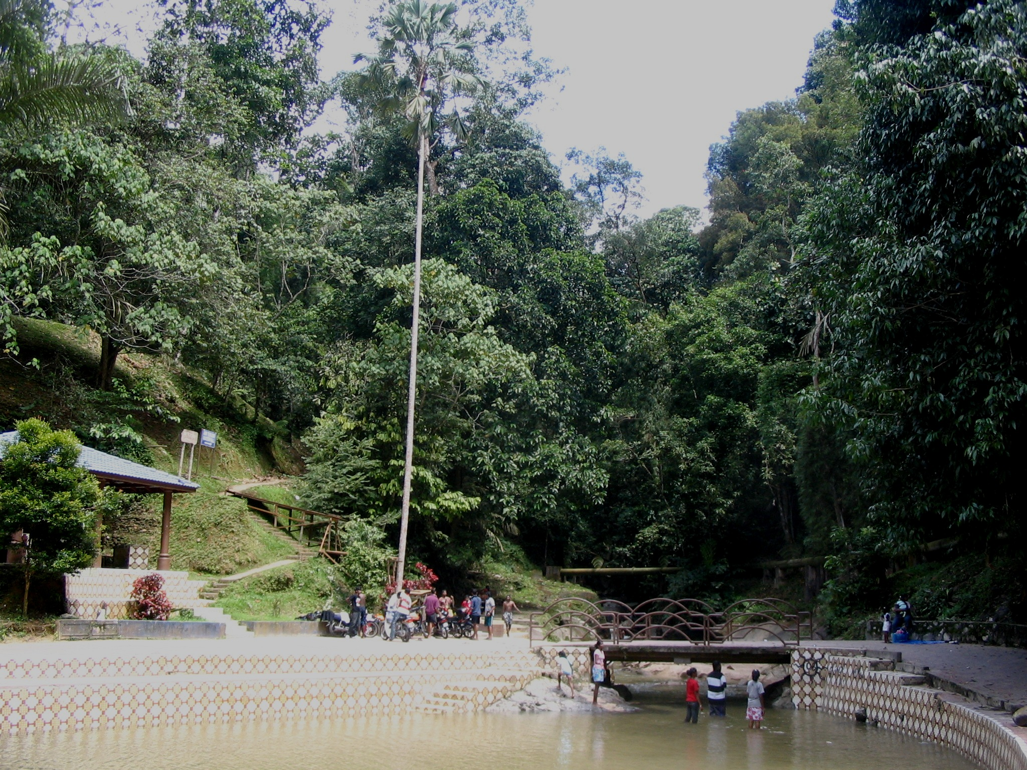 Templer Park:Malaisie, dans le Selangor, à 21 km au nord de Kuala Lumpur, en direction de Rahang.